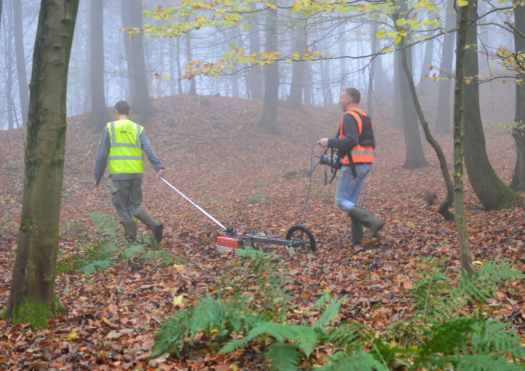 Georadarmessung in der Heisterburg